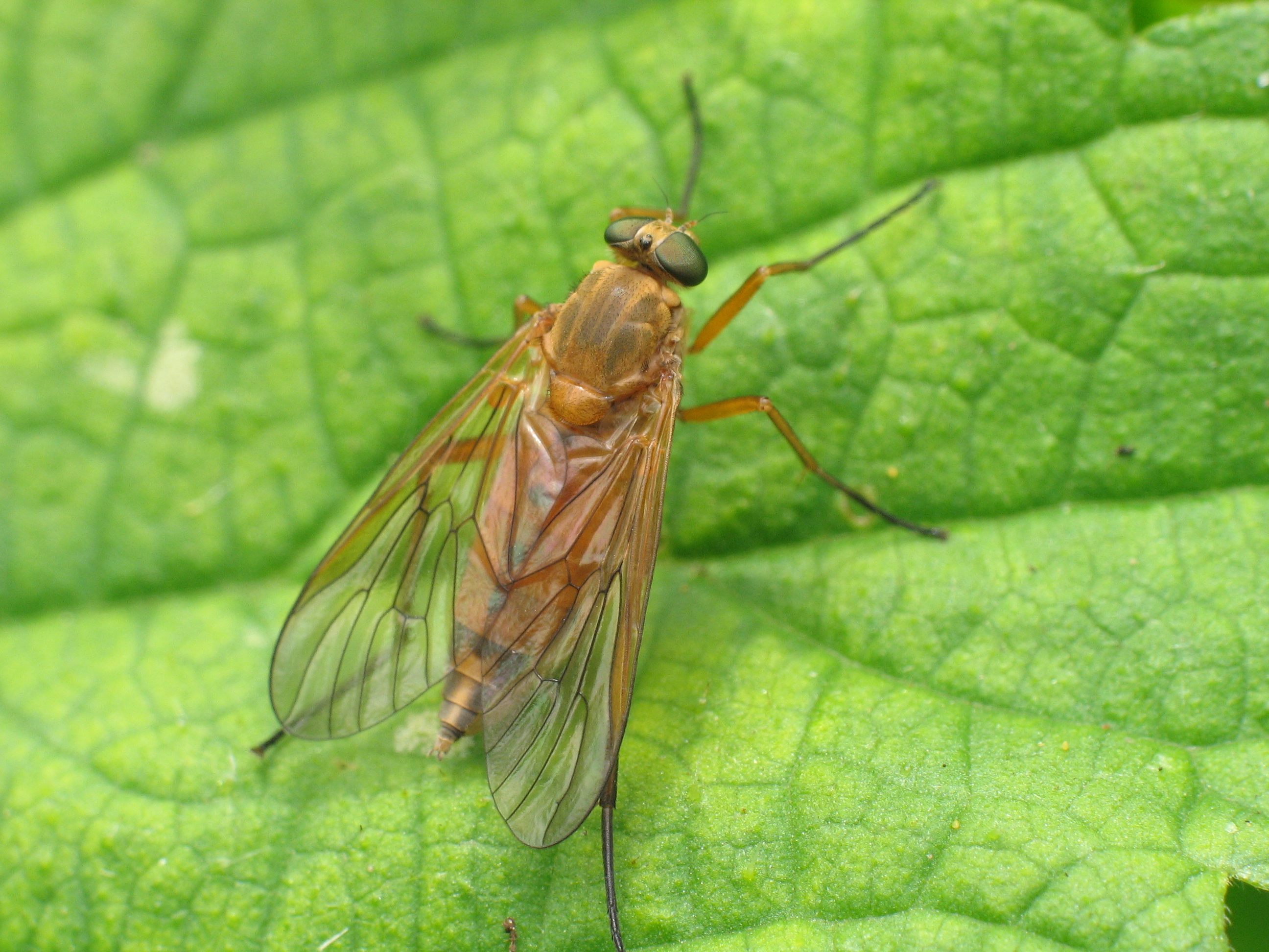 Kobylica przyleśna (Symphoromyia immaculata), Location Zgierz (Słupsk County, Pomeranian Voivodeship)